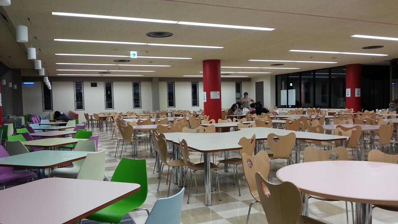 跡見学園女子大学